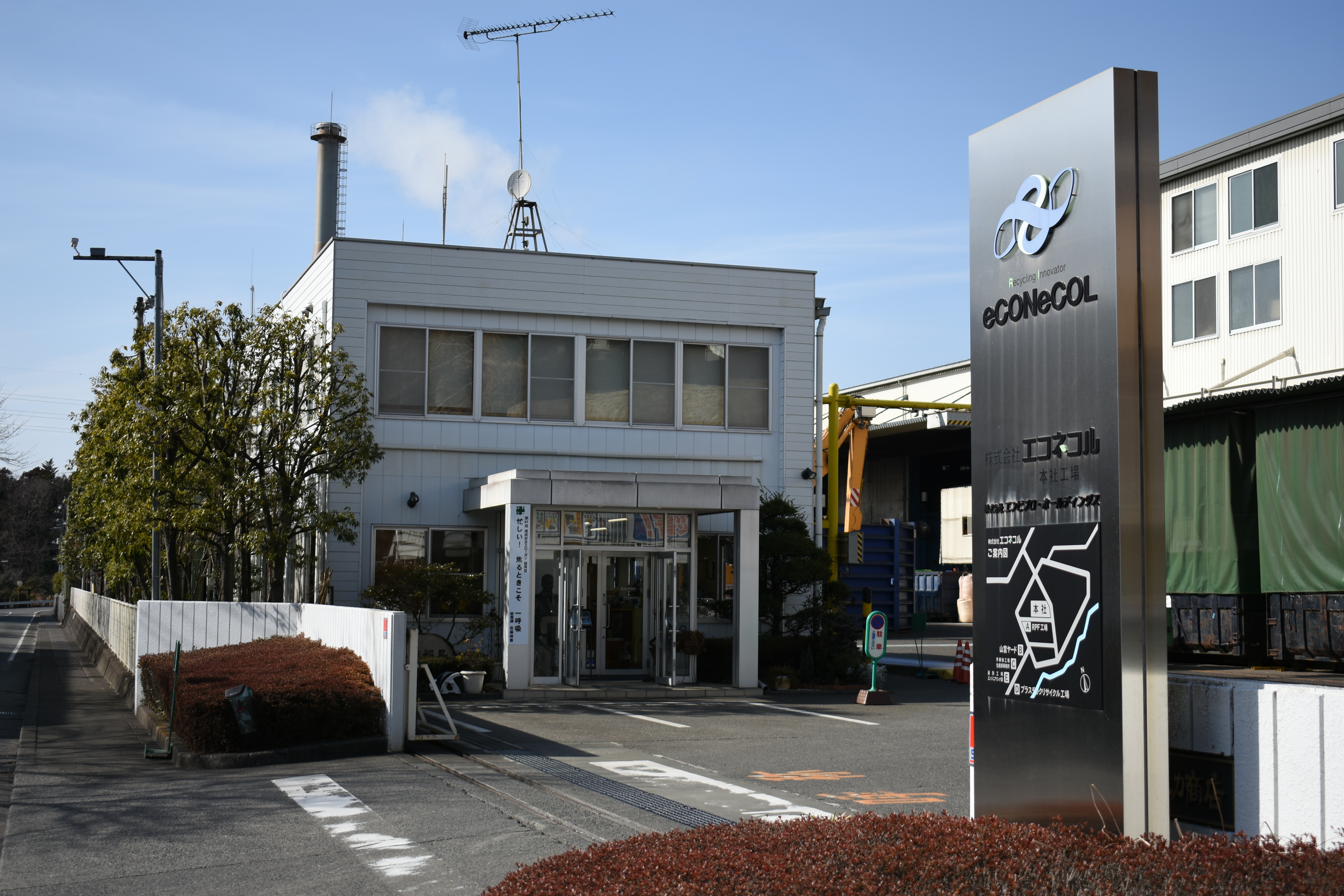 エンビプロ・ホールディングス の本社社屋（静岡県富士宮市、山宮工業団地内）